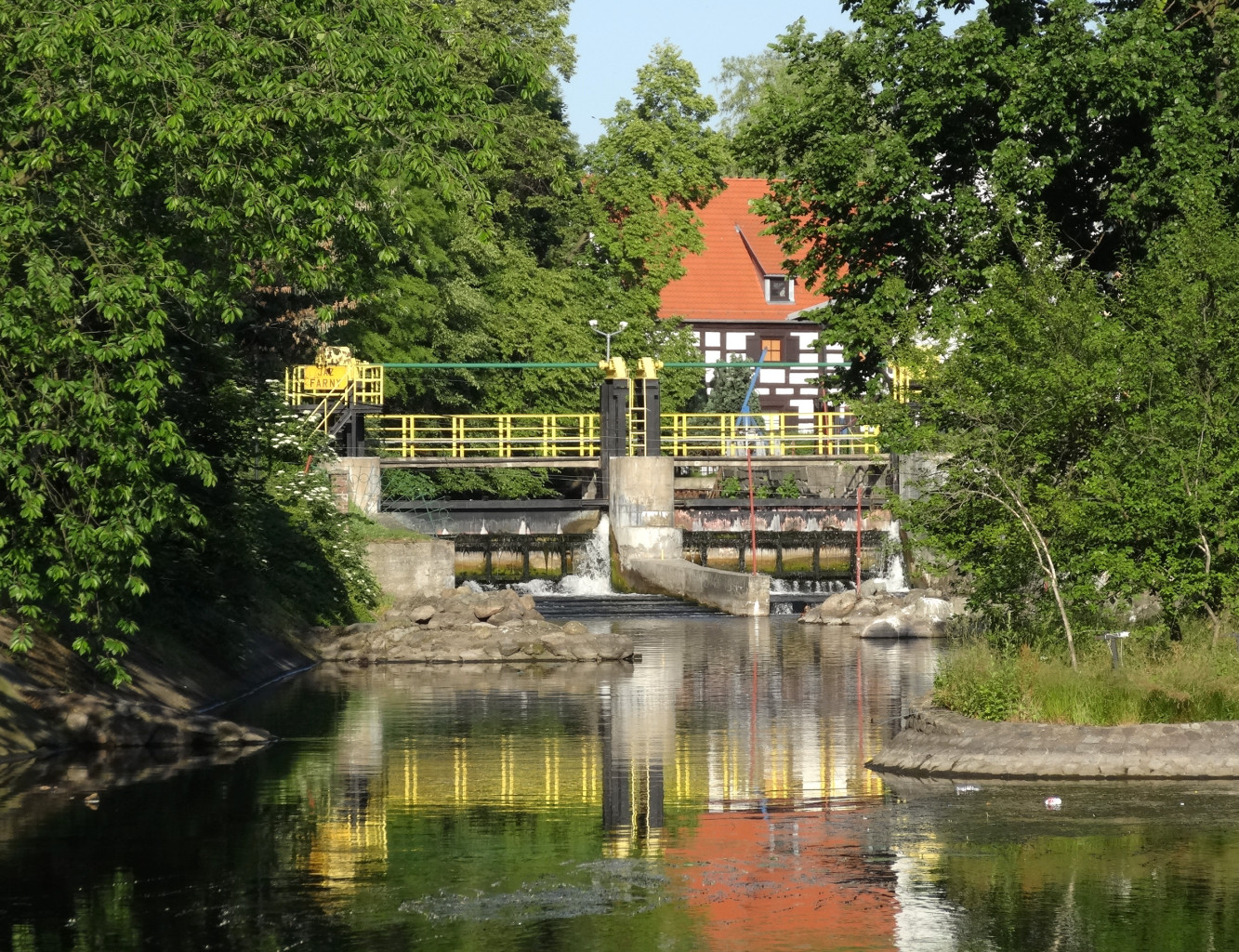 Jaz Farny na Brdzie w pobliżu katedry w Bydgoszczy